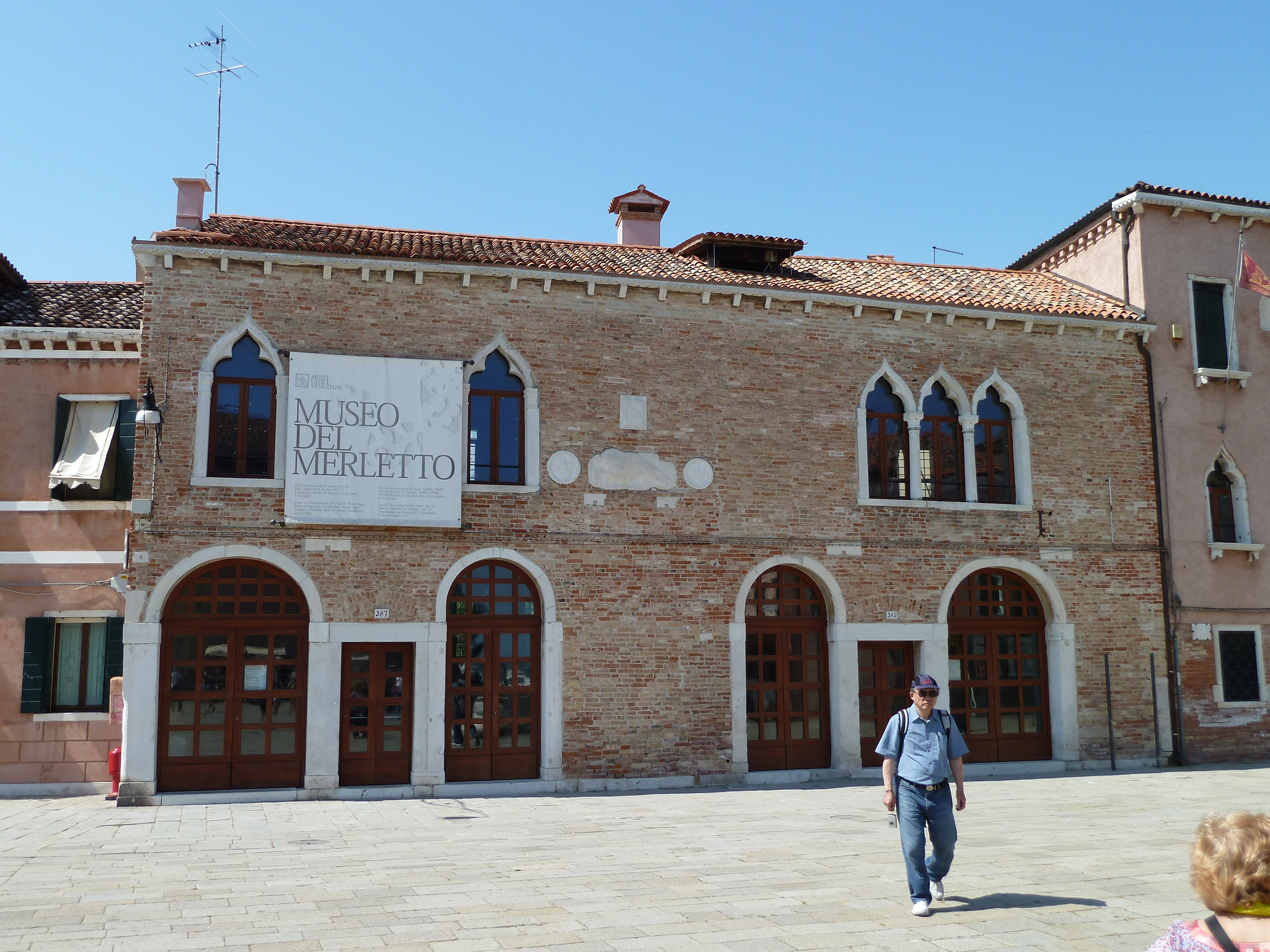 musée de la dentelle